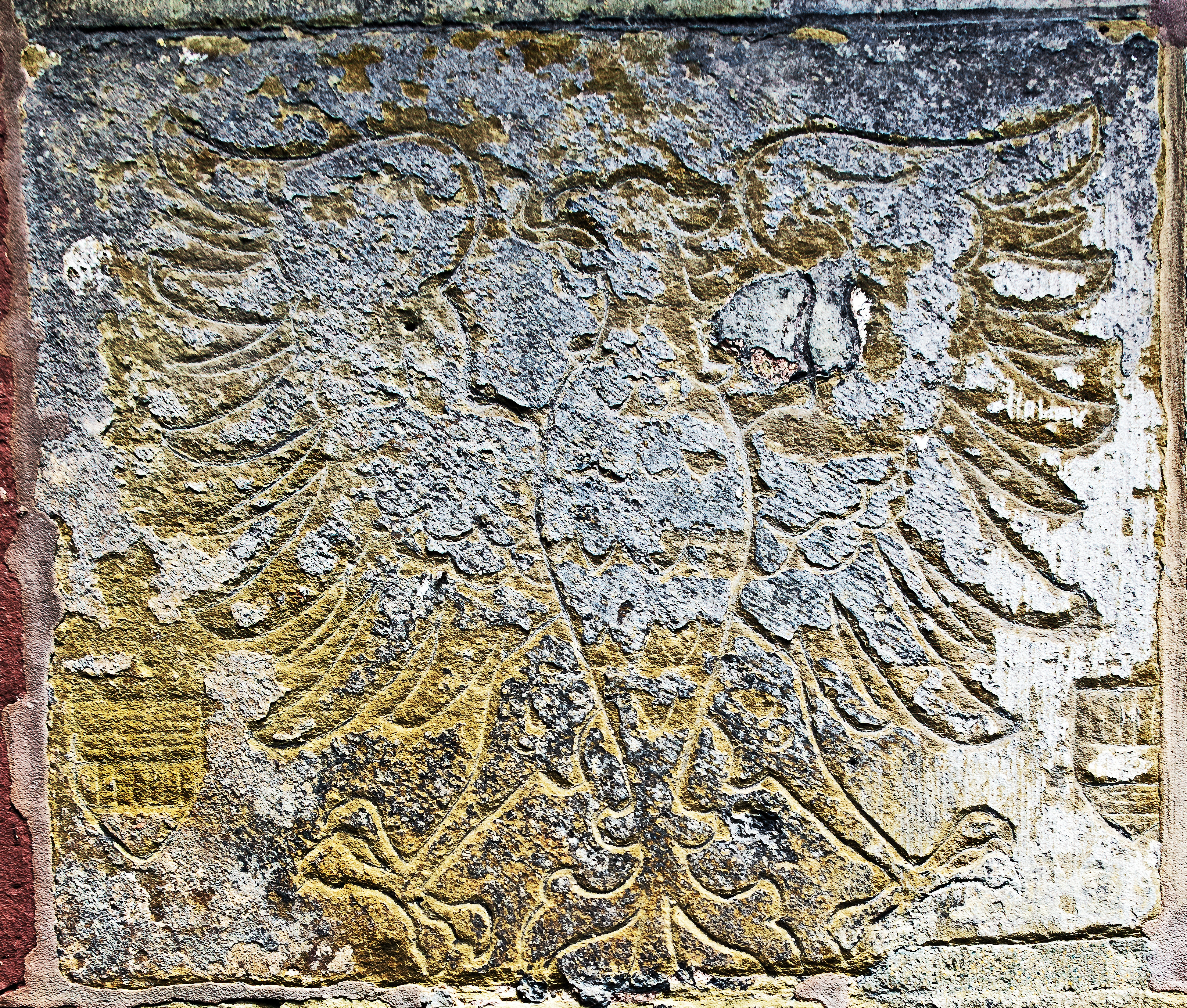 Reformationsdenkmal an der Südfassade der Hospitalkirche in Stuttgart, Wandrelief Nr. 15 (Nummerierung siehe file:Hospitalkirche, 002.jpg): Reichsadler, links und rechts unten ein kleines Wappen.